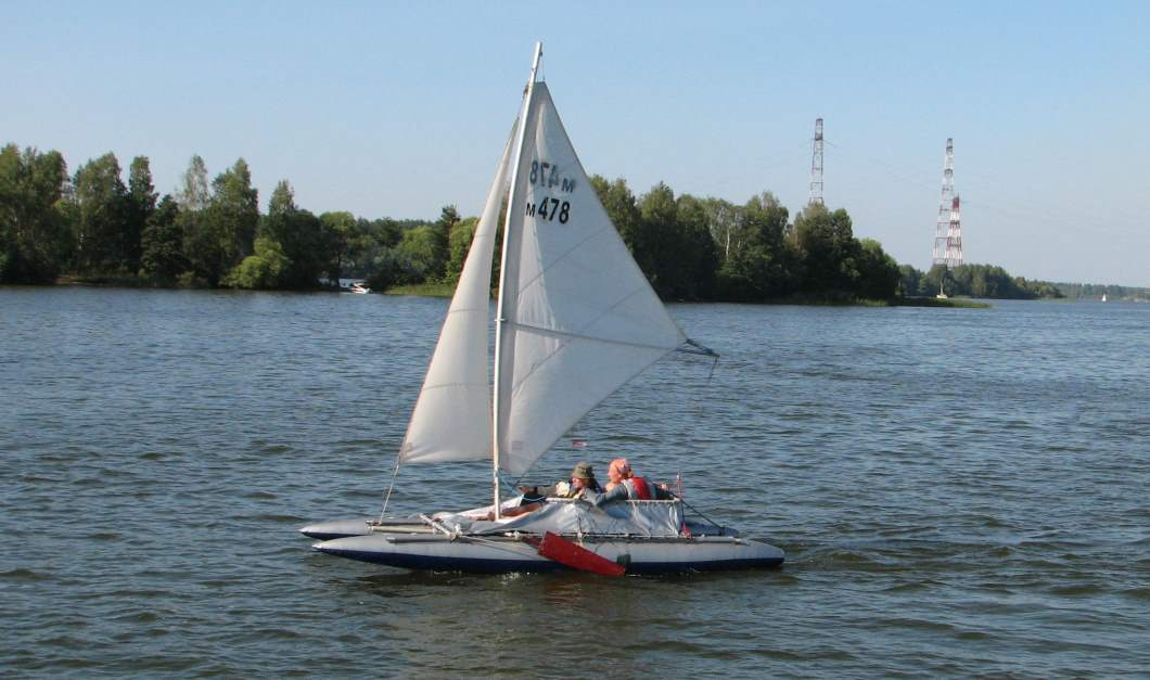 Катамаран Альбатрос на новых баллонах из ПВХ, участник Верхневолжской регаты.